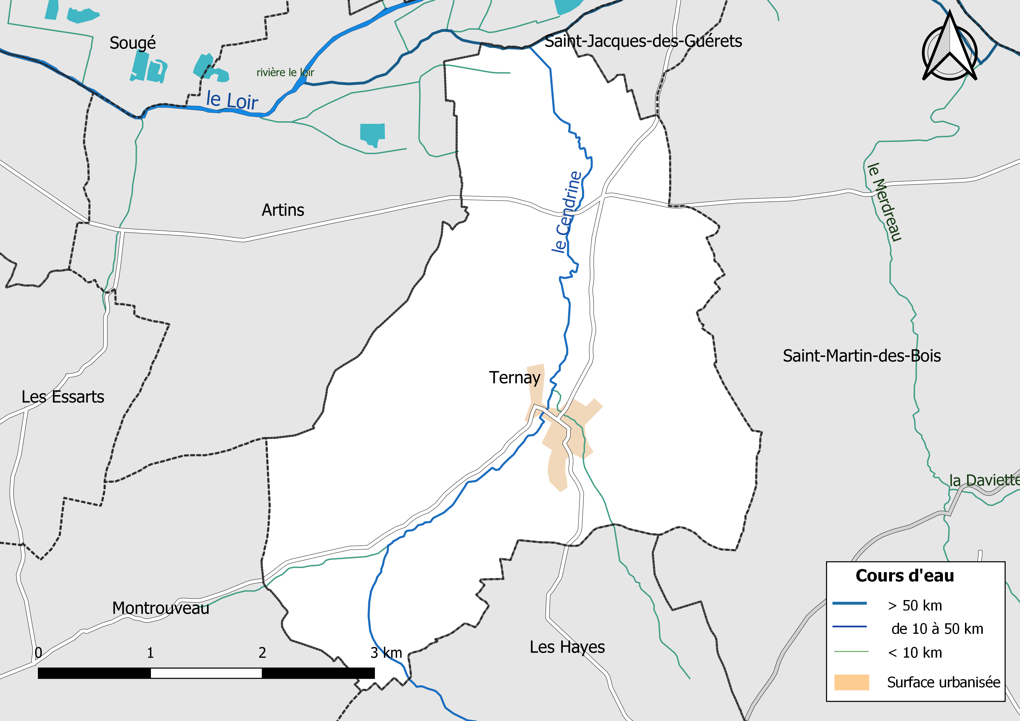 Carte du réseau hydrographique de la commune de Ternay (Loir-et-Cher, France).